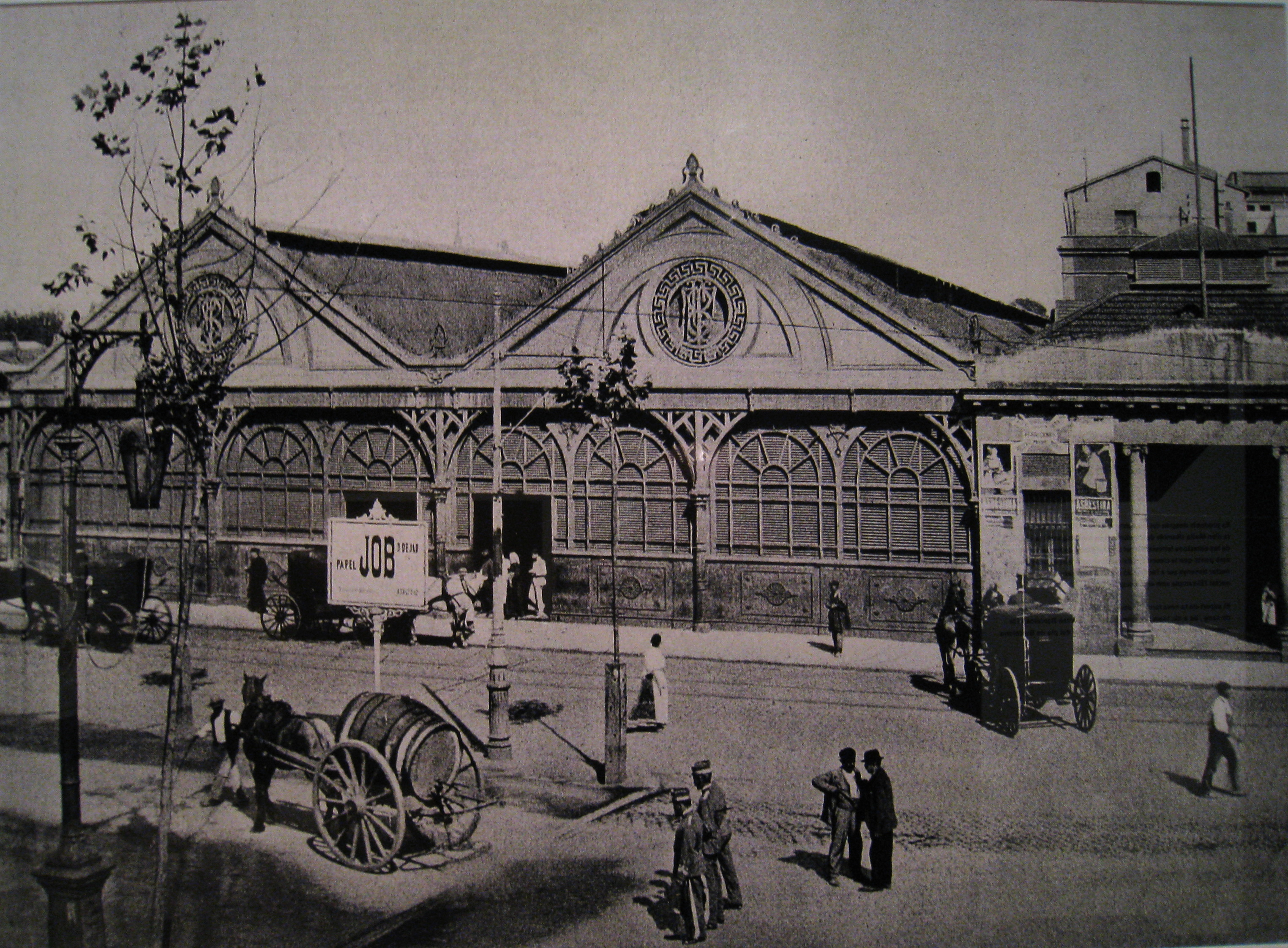 Estació de França Construida per la Companyia dels Ferrocarrils de Tarragona Barcelona i frança